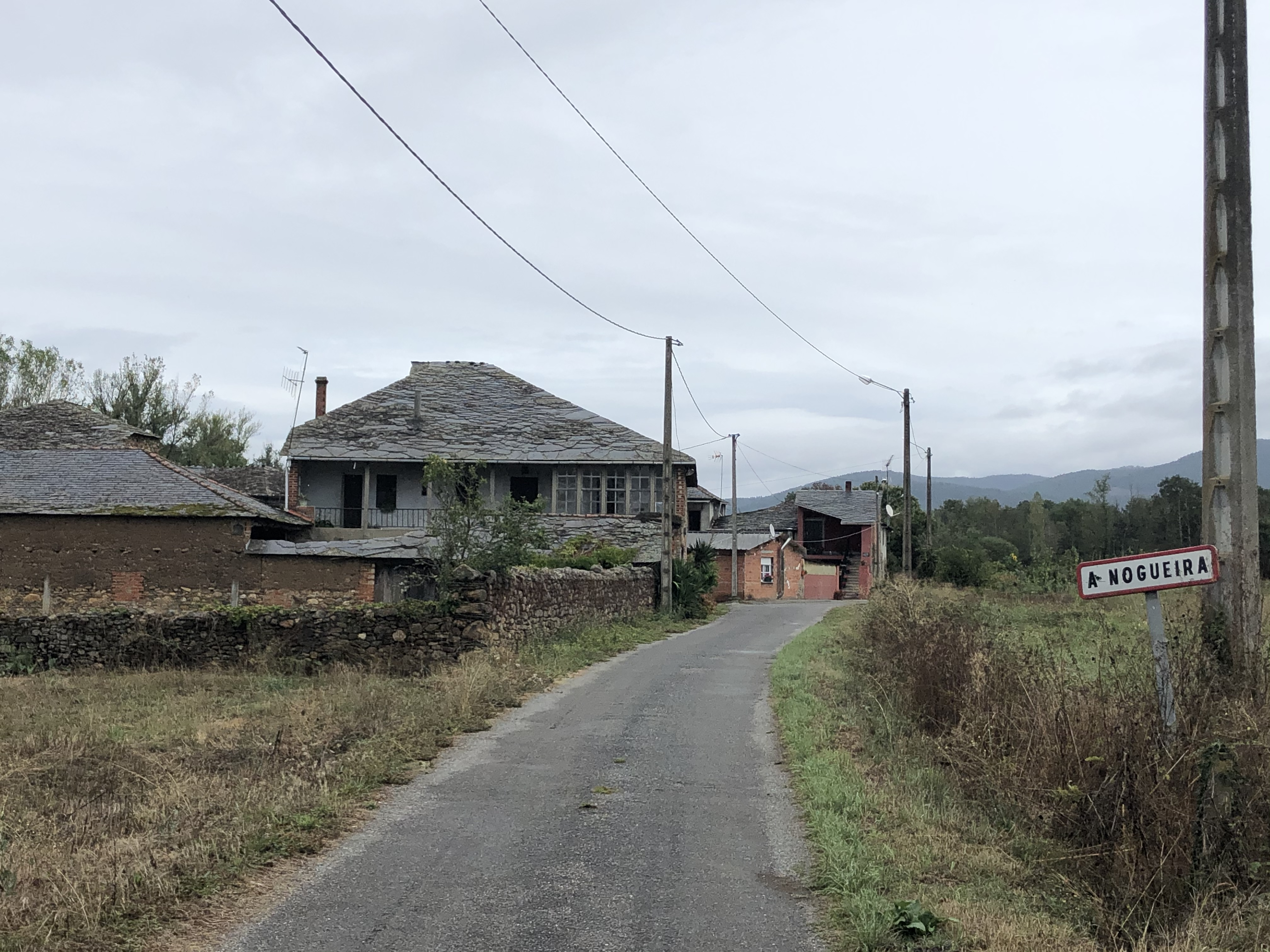 Lugar de A Nogueira, en la parroquia de Eixón, municipio de A Pobra do Brollón (Provincia de Lugo, Galicia, España).